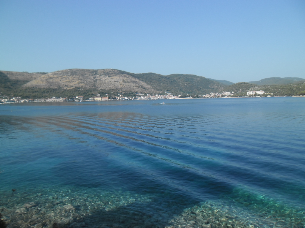 grad Vis